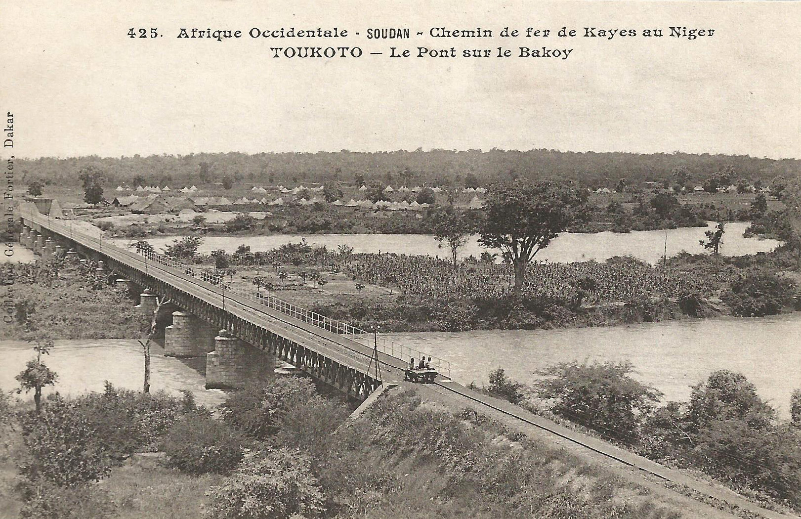 François-Edmond Fortier, Toukoto. Le pont sur le Bakoy. Afrique Occidentale - Soudan - Chemin de fer de Kayes au Niger.